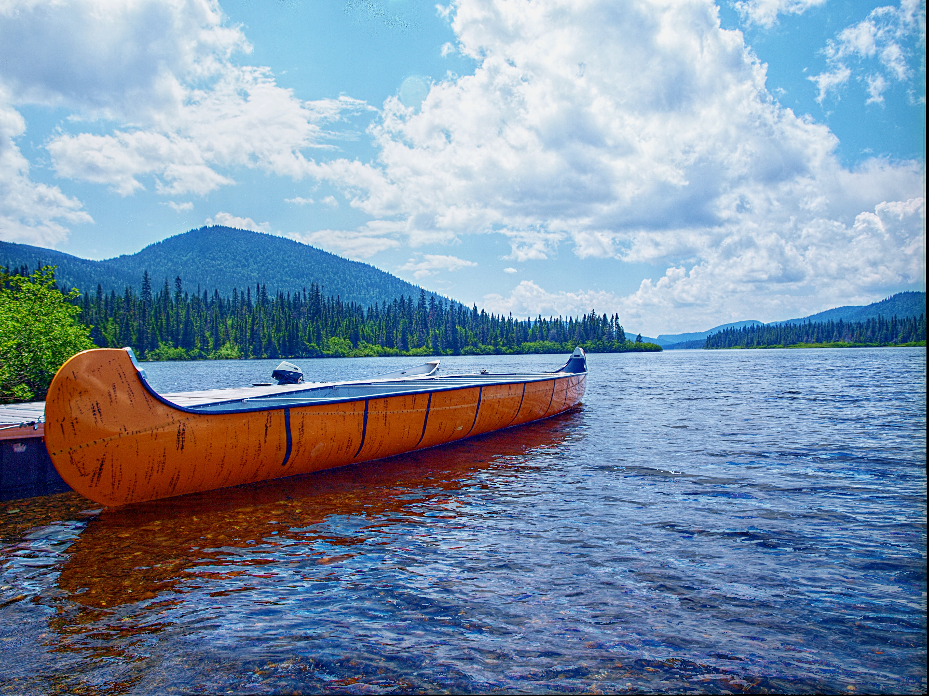 Canot sur le lac Cascapédia en Gaspésie